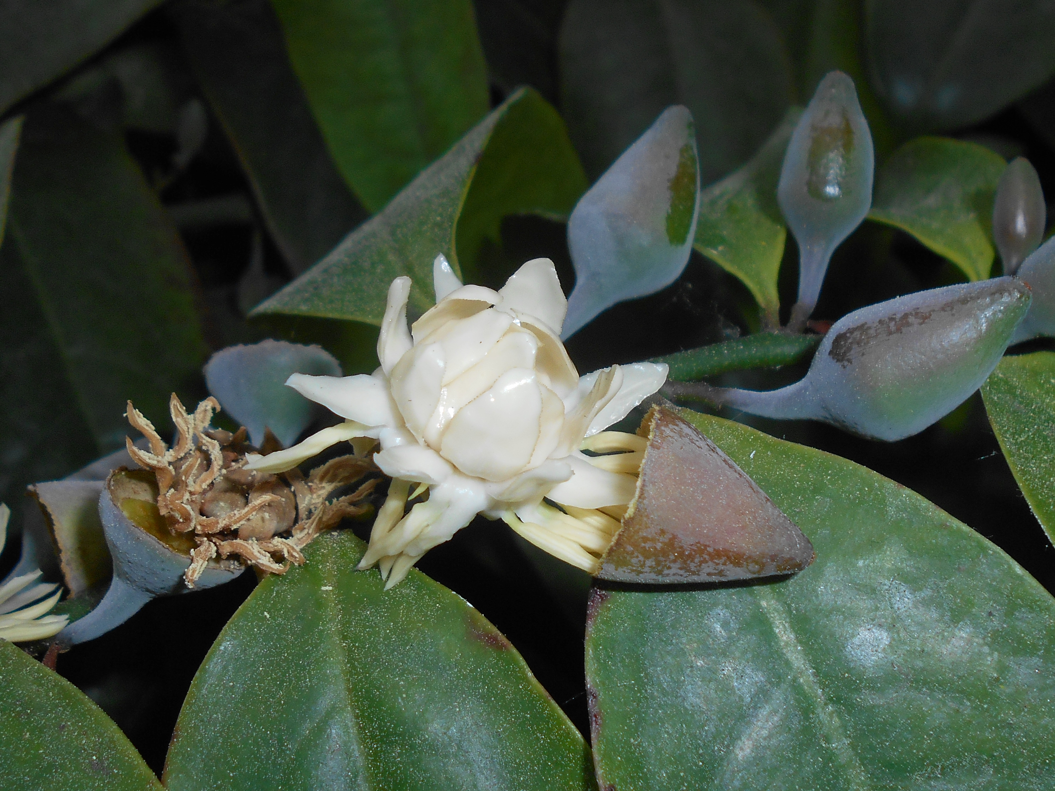 Eupomatia laurina, Botanischer Garten Berlin.